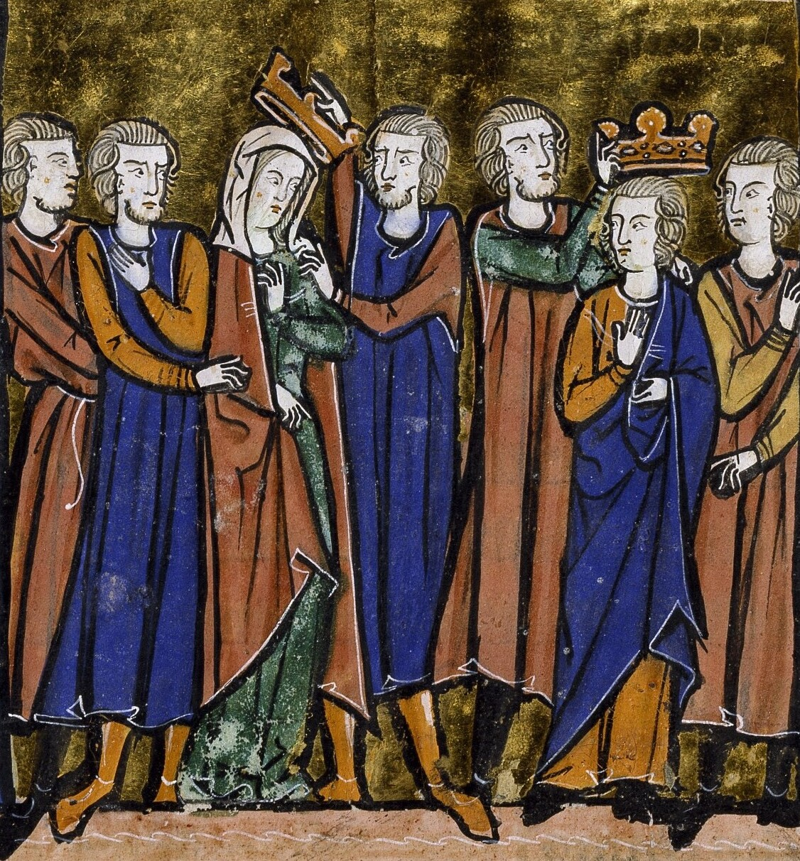 Couronnement de Baudouin III